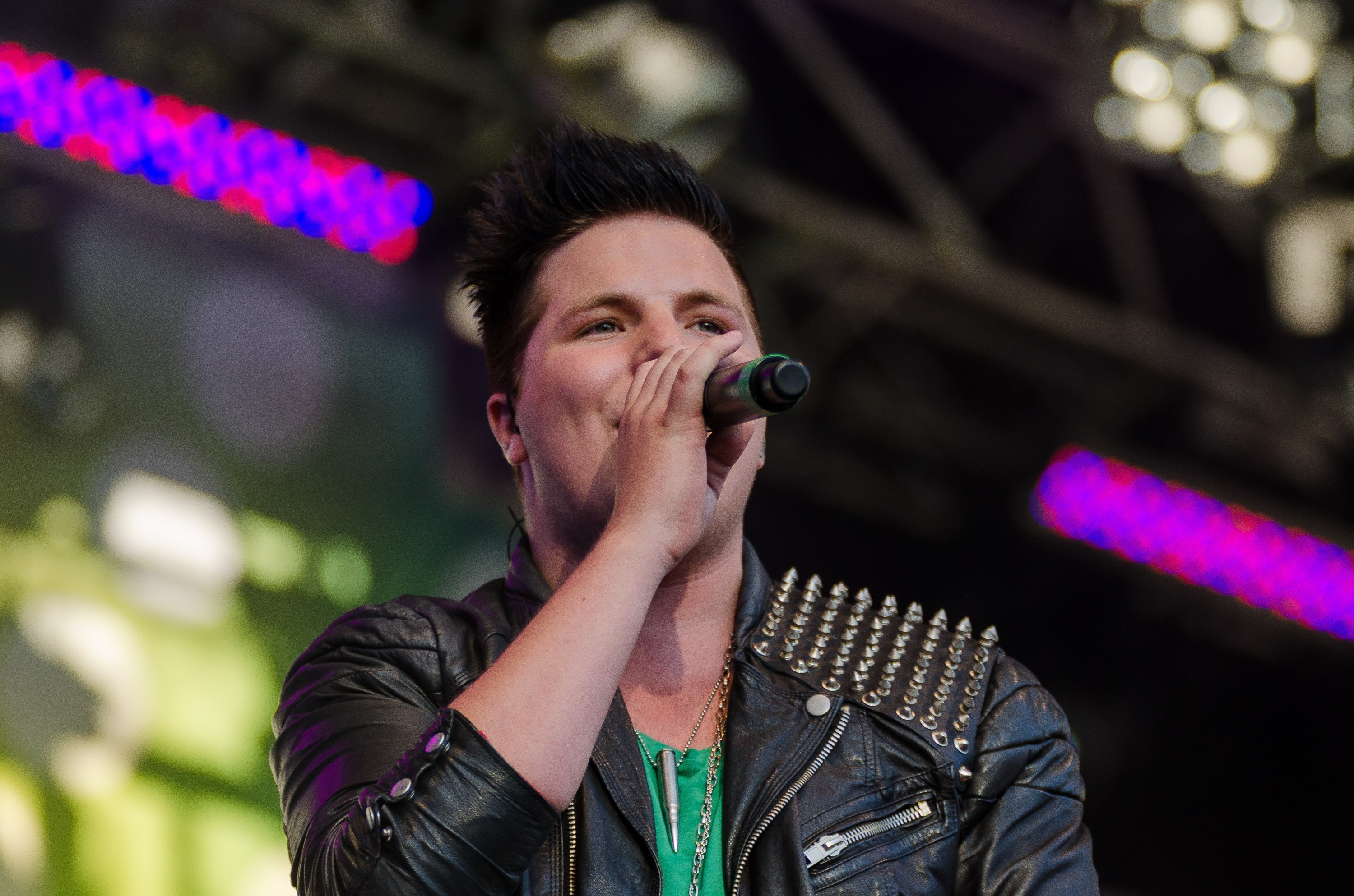 Idol-tvåan Robin Stjernberg uppträder på Rix FM Festival i Växjö 2012.